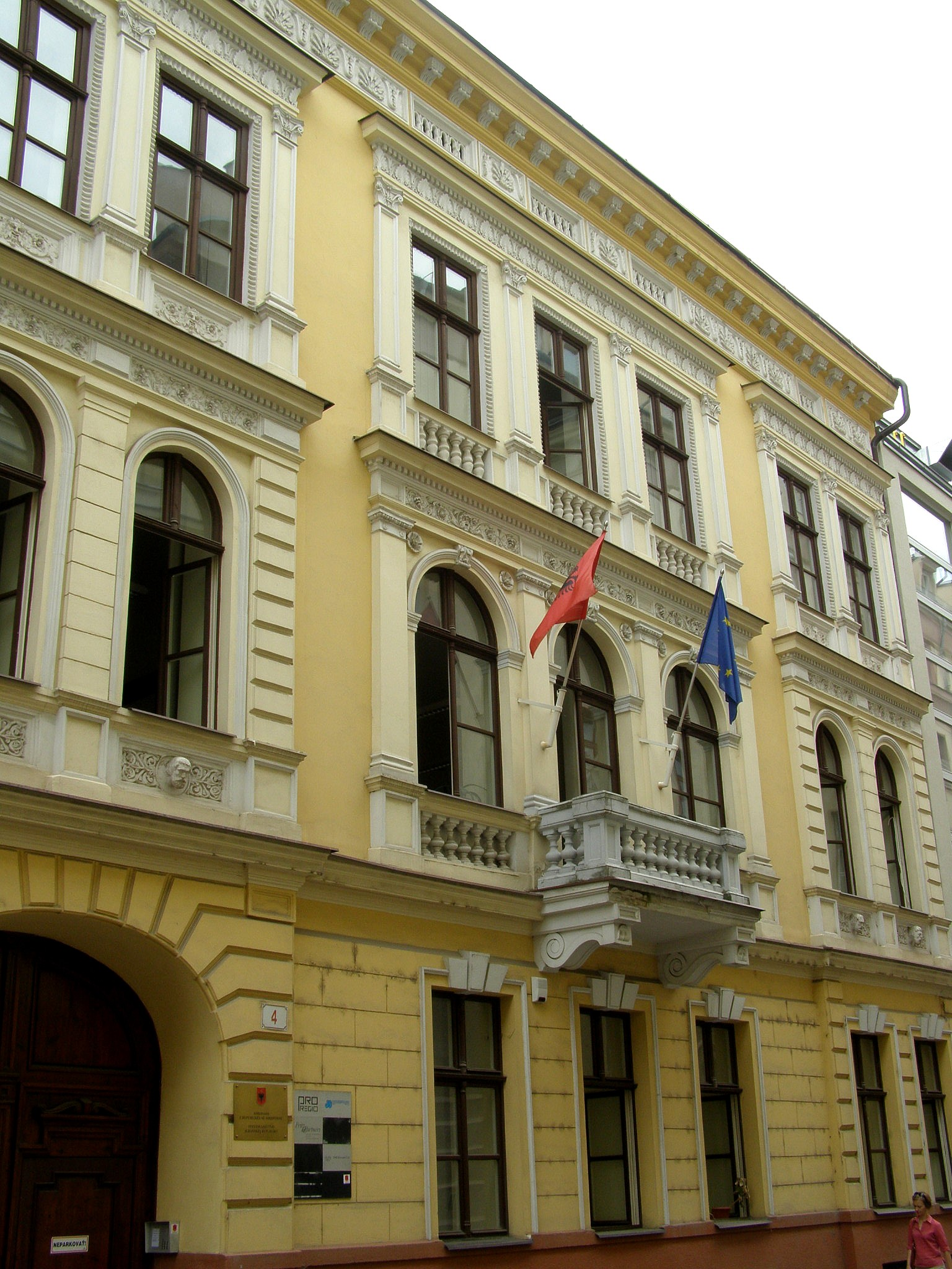 Podjavorinskej ul. č. 4. V budove sídli o.i. veľvyslanectvo Albánska